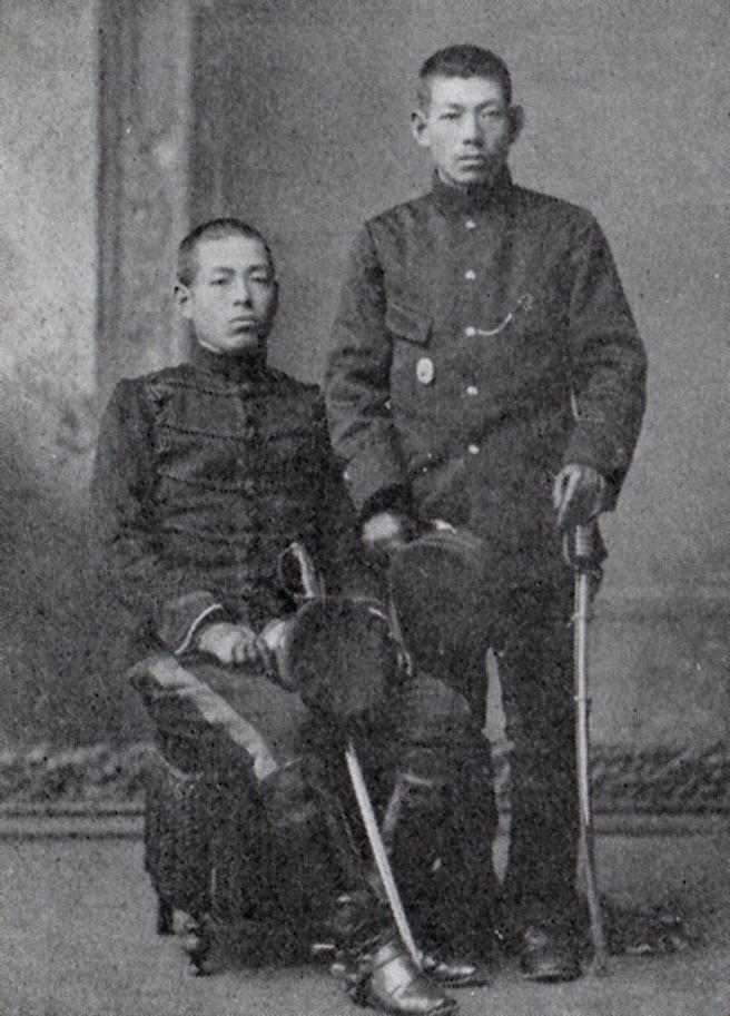 左 畑俊六 右 畑英太郎